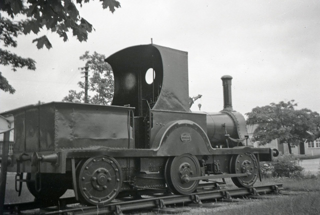 Gazelle at Longmoor Camp